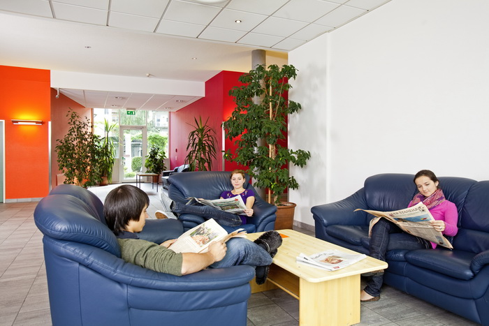 Leseecke